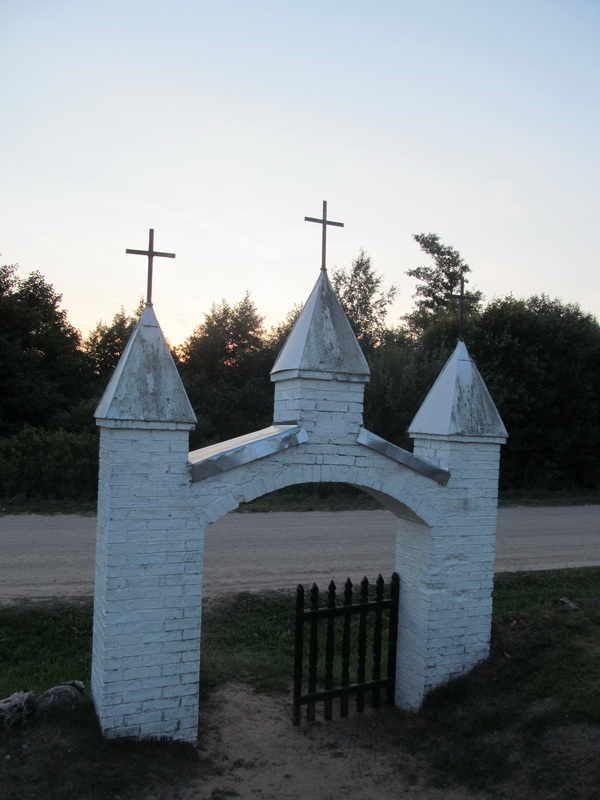 Груштэлішкі. Брама на могілках